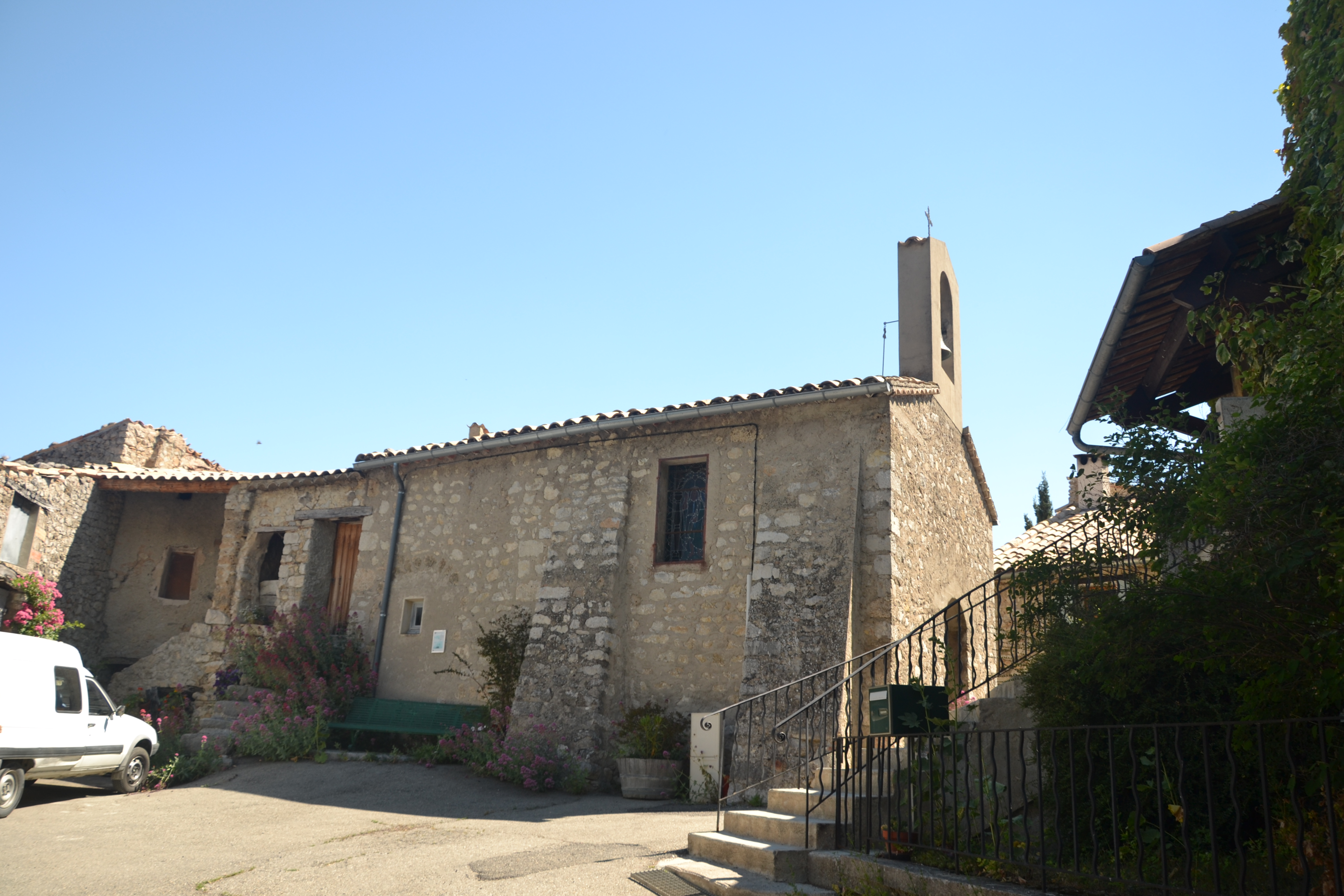 église de Montréal les Sources